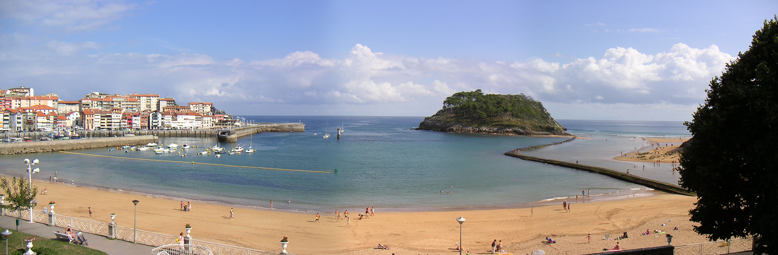 Lekeitio, Bizkaia. Euskal Herria. Lekeitio, Bizkaia. Basque Country.